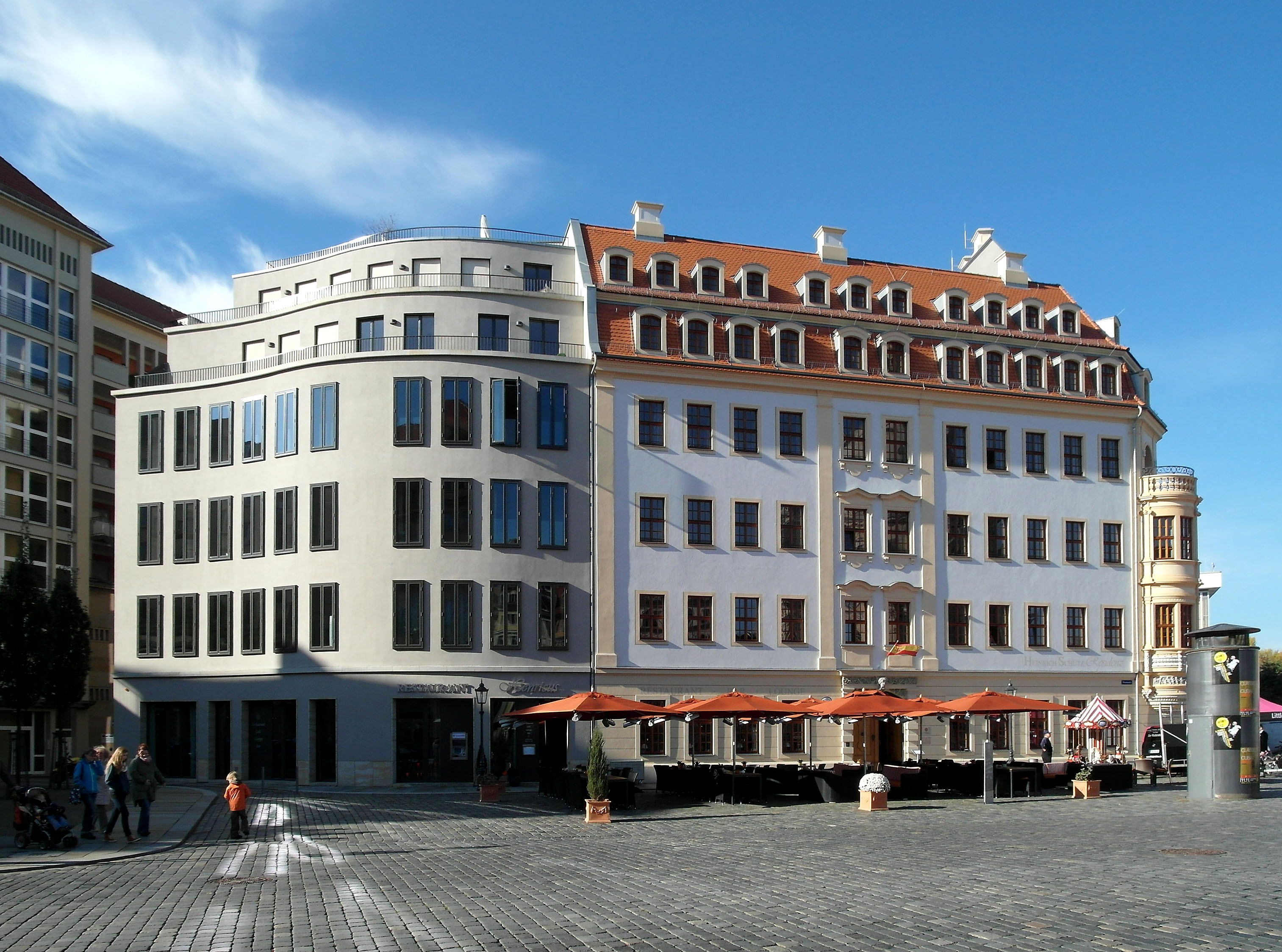 18.10.2012 01067 Dresden-Altstadt, Neumarktgebiet: Heinrich-Schütz-Residenz (2008). Links der zugehörige Neubaut Neumarkt 11. Rechts das Heinrich-Schütz-Haus, Neumarkt 12. Um 1530 (+2008) errichtet und von 1629-1657 im Besitz des Hofkapellmeisters Heinrich Schütz. Rechts der Runderker mit dem Kinderfries. [SAM2283.JPG]20121018030DR.JPG(c)Blobelt